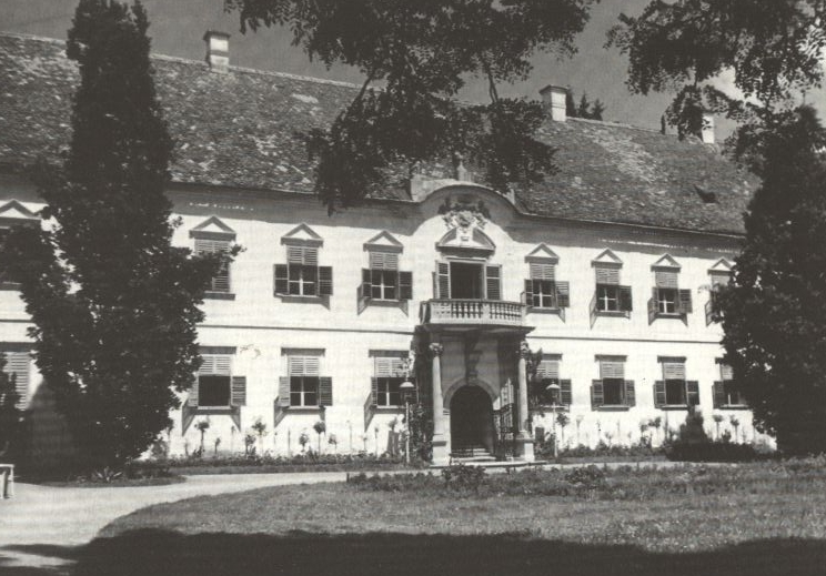 Banffy Castle in Bonţida, Cluj County, Romania